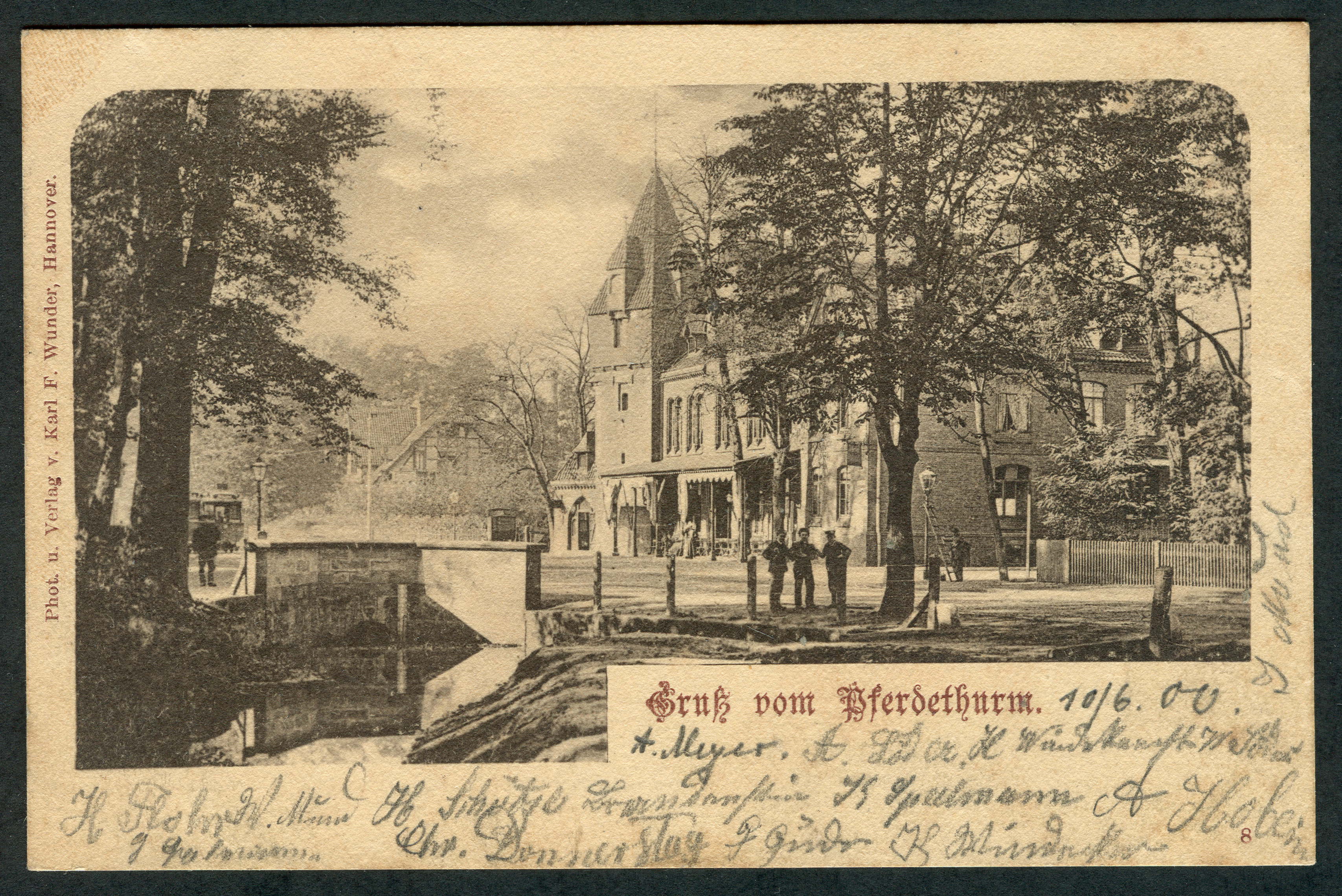 Eine der numerisch frühesten Ansichtskarten von Karl F. Wunder. Das zugrunde liegende Foto wurde vermutlich schon vor oder um 1898 aus der heutigen Kaulbachstraße aufgenommen - unter großer Anteilnahme der anwesenden Bevölkerung. Ganz links sehen wir den ehemaligen Straßenbahn-Endpunkt (Pferdebahn ?) am Pferdeturm; die Person vor der Bahn dürfte mit Sicherheit der - männliche - Zugführer sein, der sich an der damaligen Unterführung des Wolfsgrabens postiert hat. Weiter rechts im Hintergrund ein altes Fachwerkhaus. Davon rechts das Gebäude mit dem eigentlichen Pferdeturm, als Ausflugsziel umgebaut zur Waldwirtschaft. Die drei interessierten Knaben neben dem Kastanienbaum tragen neben ihren "Mützen" vermutlich noch die adrette Schuluniform. Der Mann ganz rechts hat seine Arbeit unterbrochen; seine Leiter lehnt noch an der (Gas-?) Laterne.